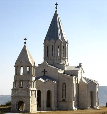 Ղազանչեցոց սուրբ Ամենափրկիչ եկեղեցի